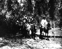 Foto tomada de una de las expediciones de Carlos Spegazzini.